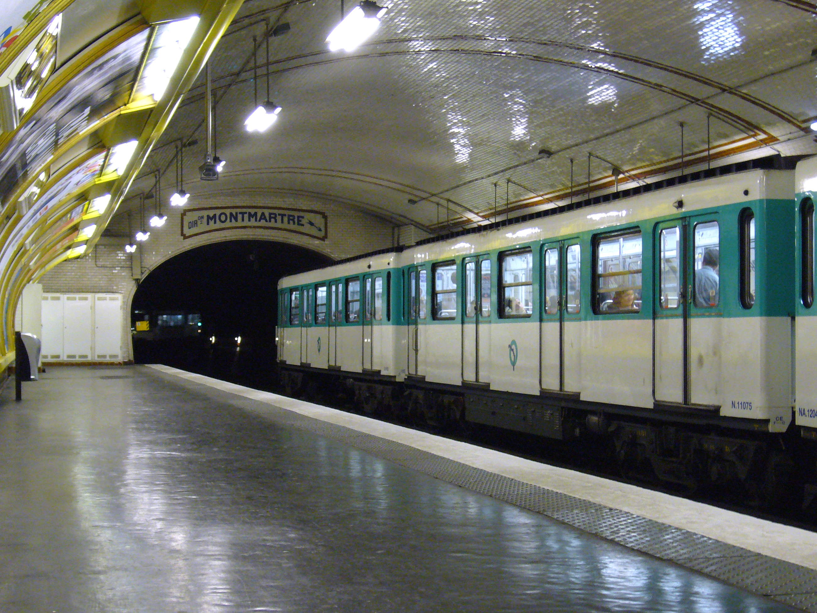 Quais de la station Falguière de la ligne 12 du métro de Paris.